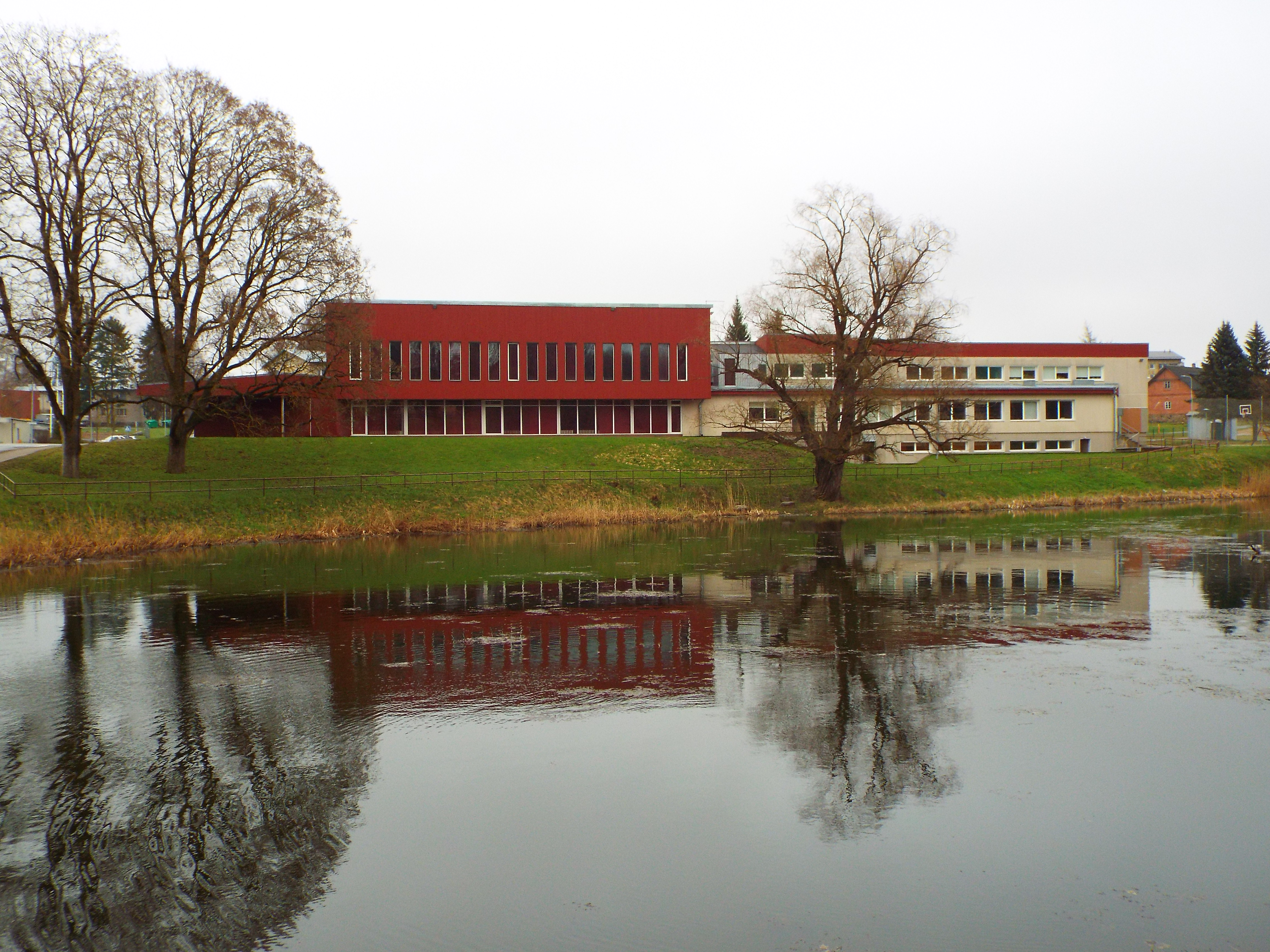 Viiratsi Kool kevadel 2018 enne 25. sünnipäeva